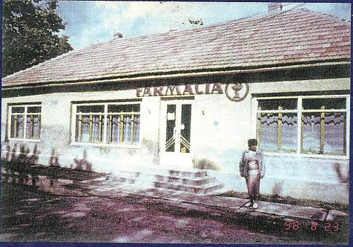 בית רב הקהילה ומשפחתו שהוסב לבית מרקחת, צילום משנת 2002